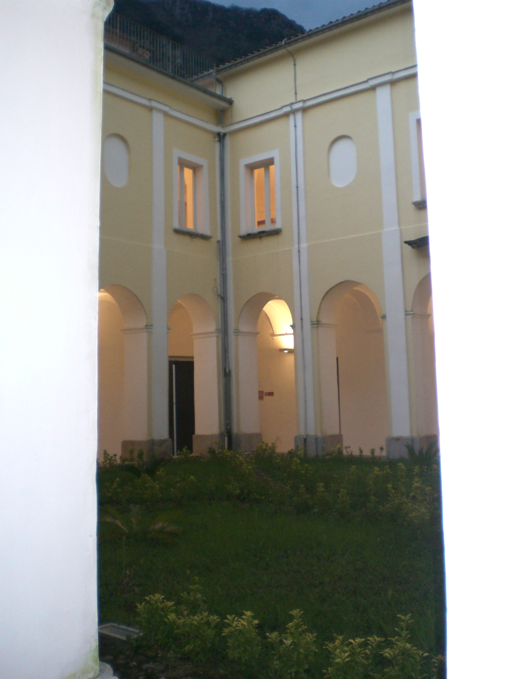 Chiostro dell'ex convento di San Bartolomeo